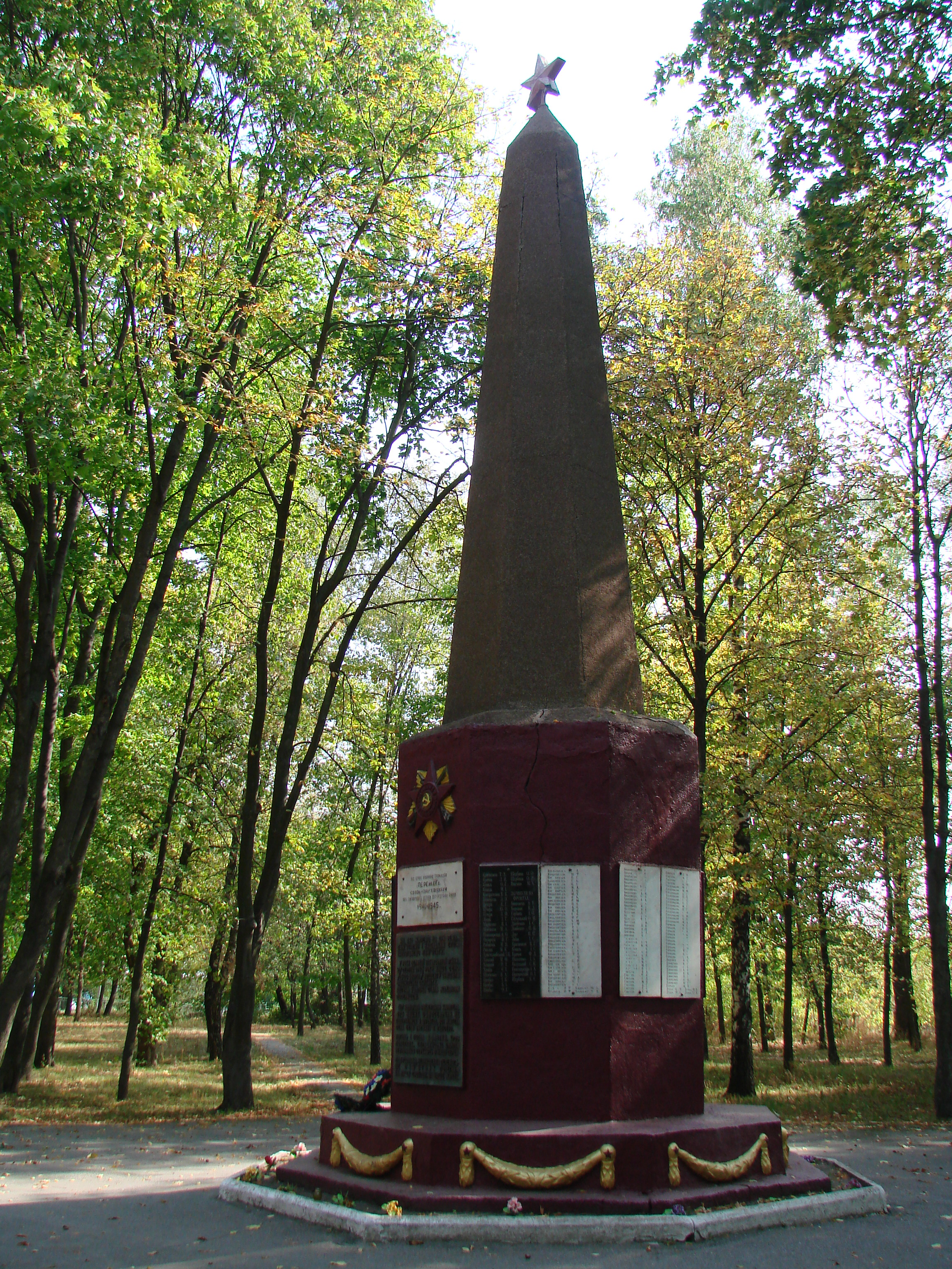 Пам'ятник воїнам-односельцям, які загинули в роки Великої Вітчизняної війни, село Перемога, парк Слави